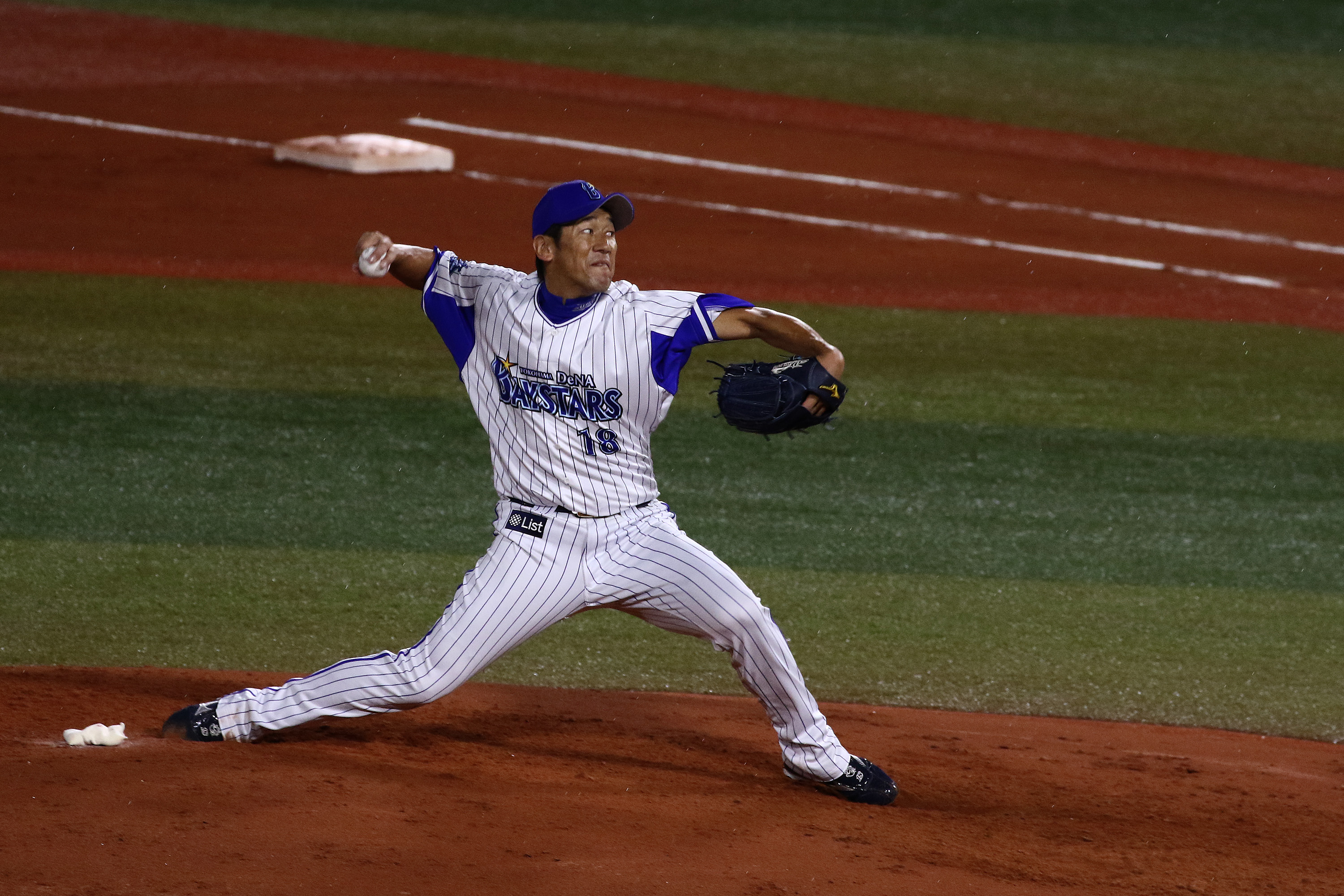 横浜DeNAベイスターズ・三浦大輔投手